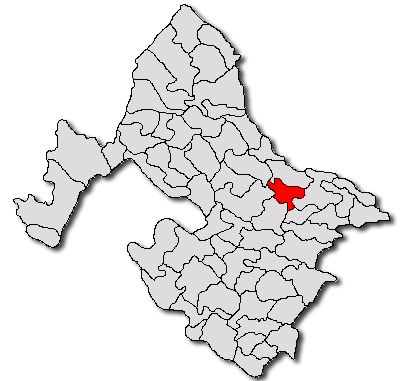 Categorie:Hărţi ale judeţului Mehedinţi